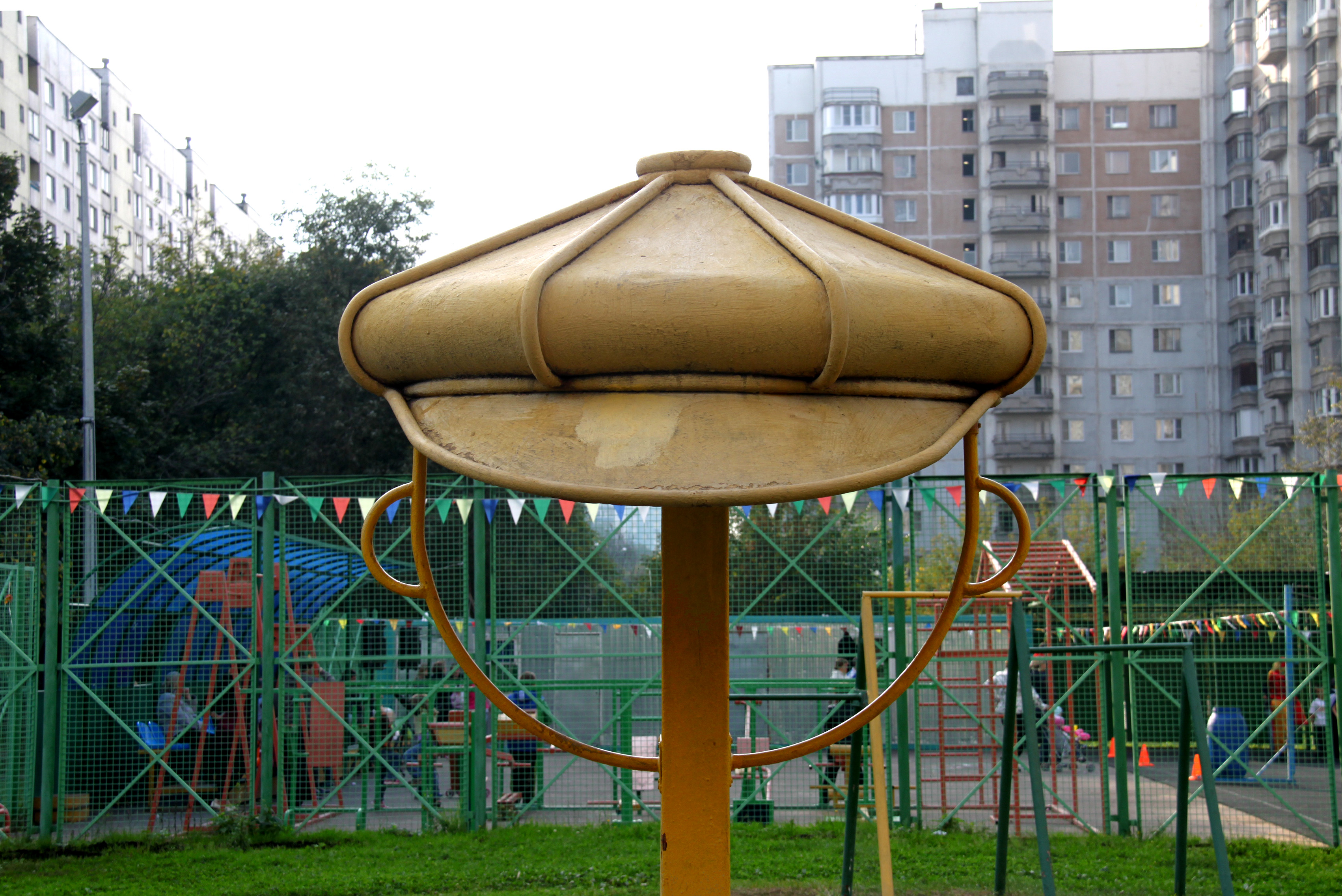 Кепка - крыша над песечницей